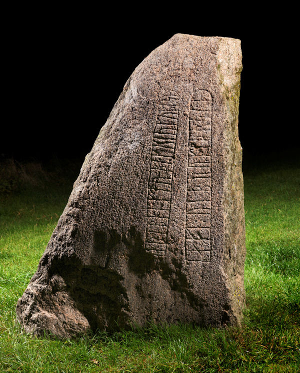 Foto af Roberto Fortuna